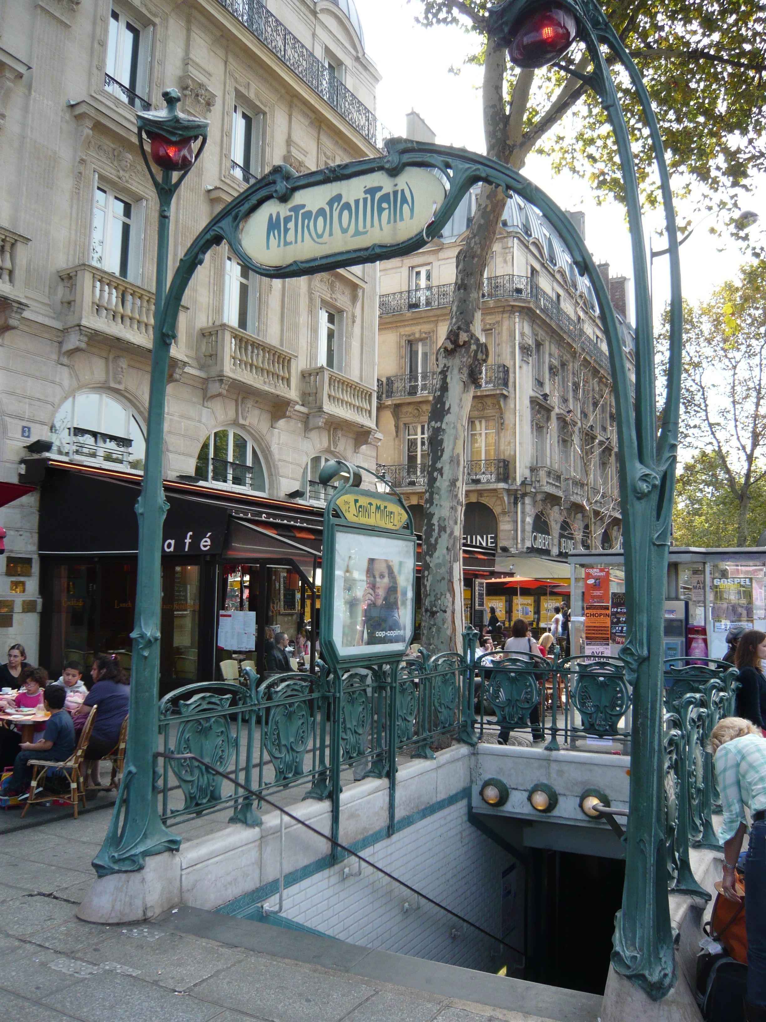 Edicule Guimard Station Saint-Michel Ve